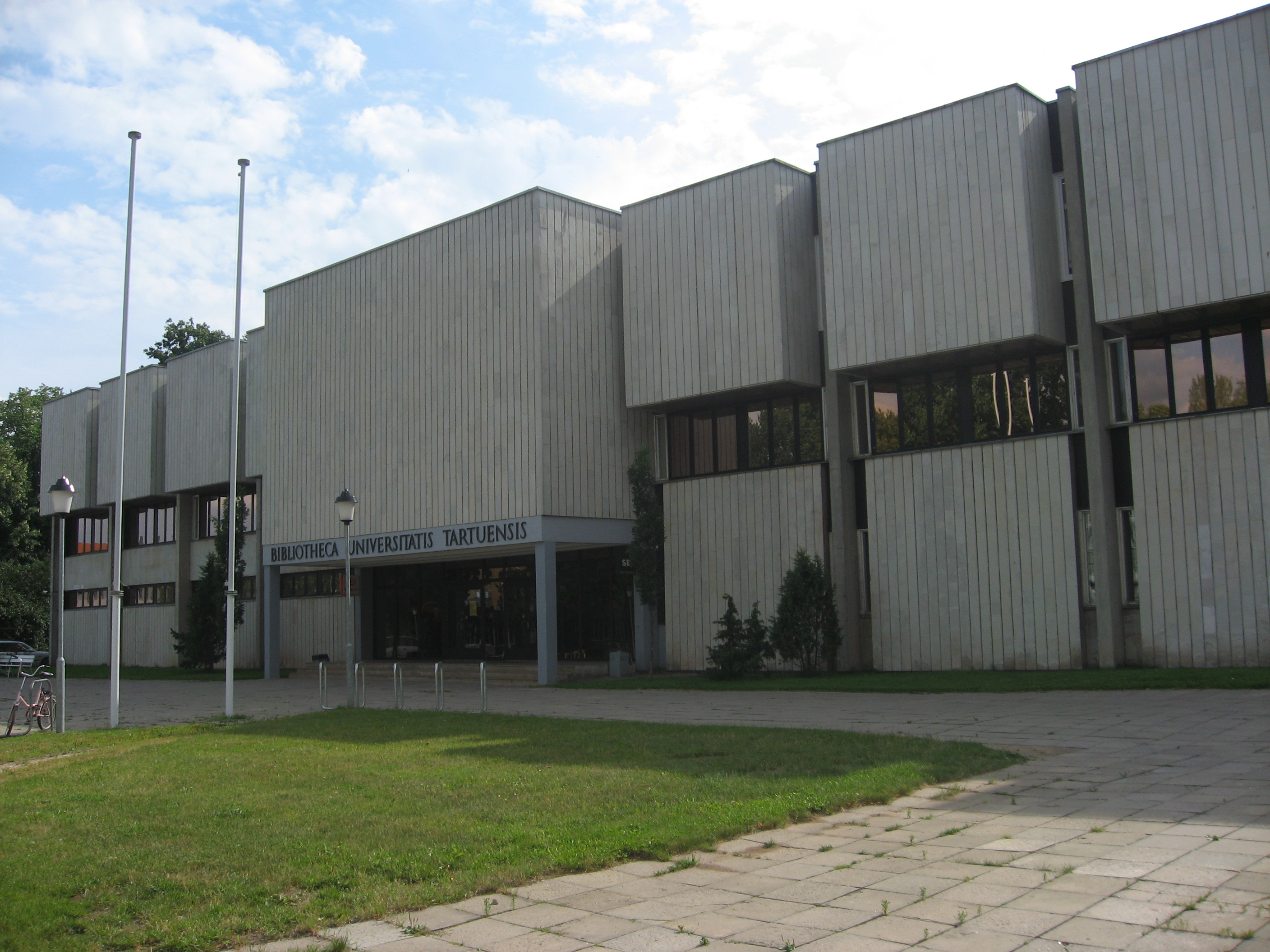 Bibliotheca Universitatis Tartuensis